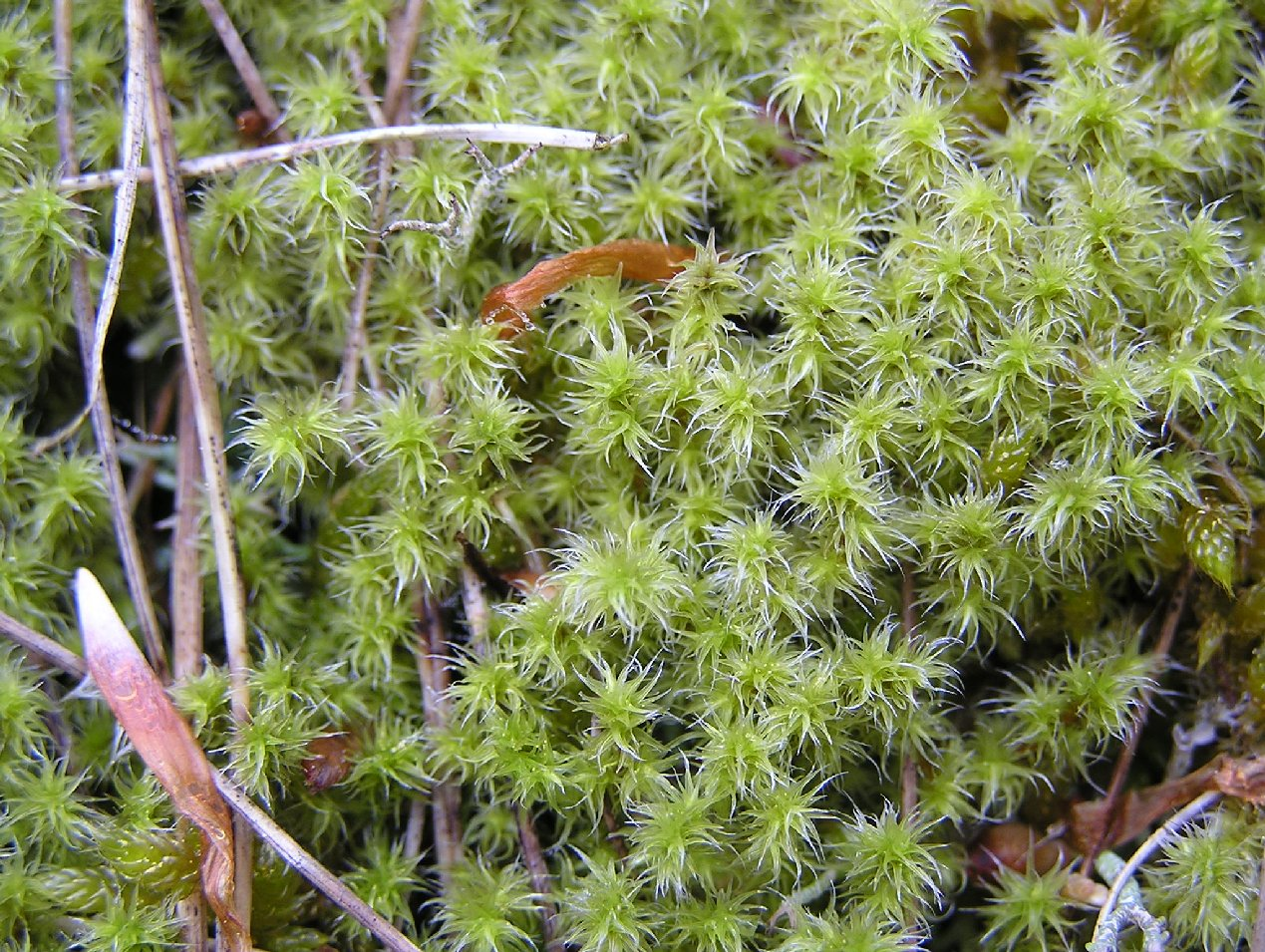 Hedwigia ciliata in feuchtem Zustand in der Nähe von Altenahr.